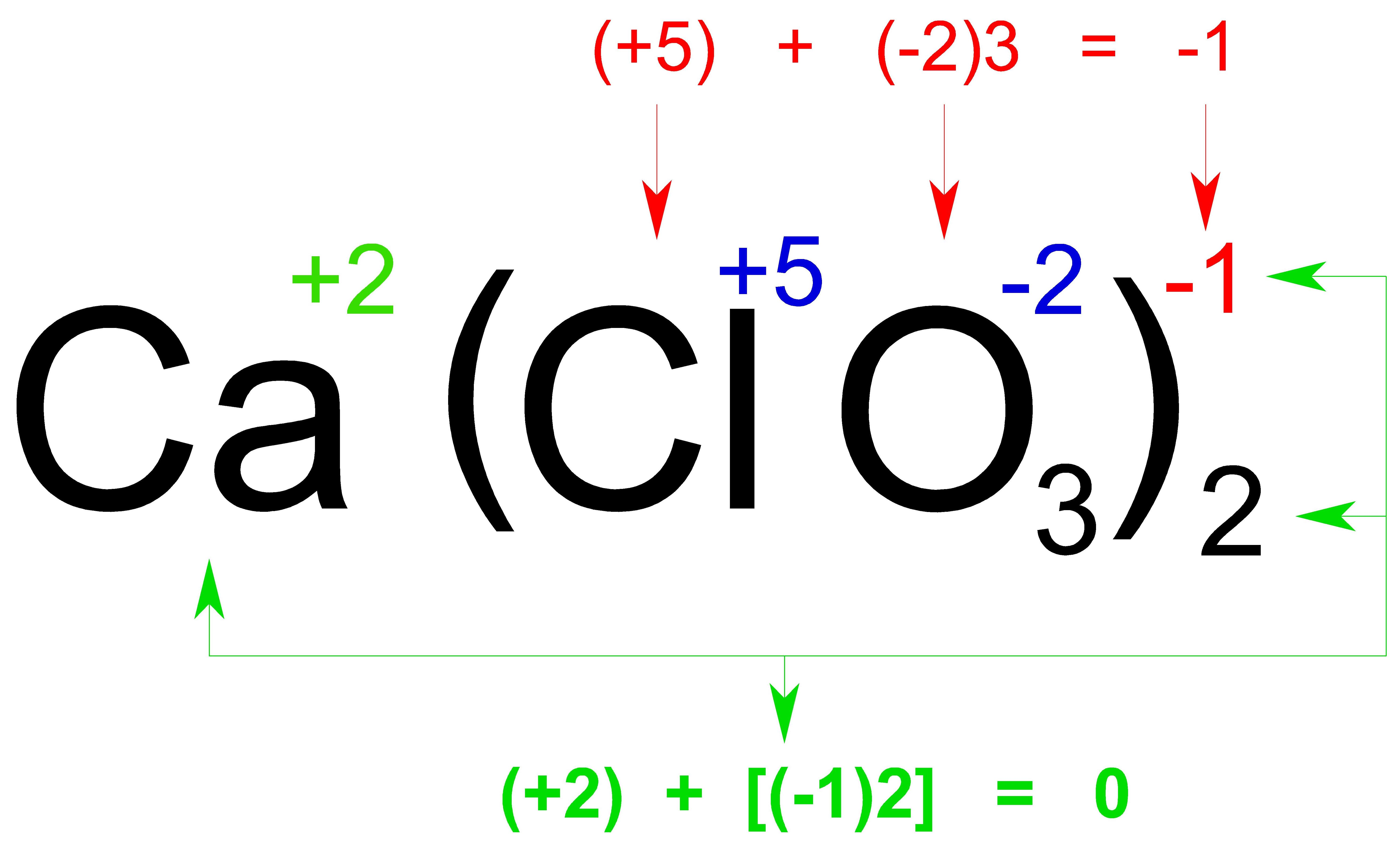 ESTA IMAGEN ES LA VERSION EDITADA DEL ARCHIVO Clorato de calcio.jpg POR EL ERROR EN EL SIGNO DE MULTIPLICACION. Diagrama sobre la distribución de valencias en un compuesto ternario. Esta imagen es explicada en la seccion 7.1 del articulo Nomenclatura química de los compuestos inorgánicos